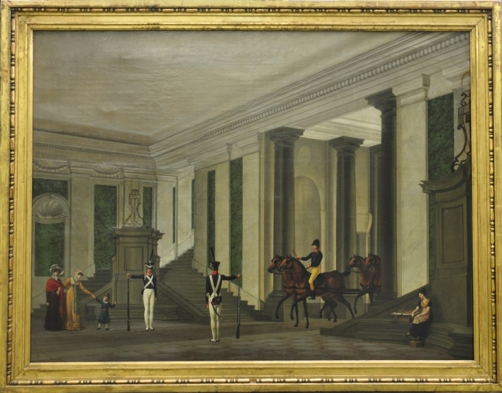 Carl Gropius, Portaldurchfahrt Berliner Schloss, Ölgemälde um 1820